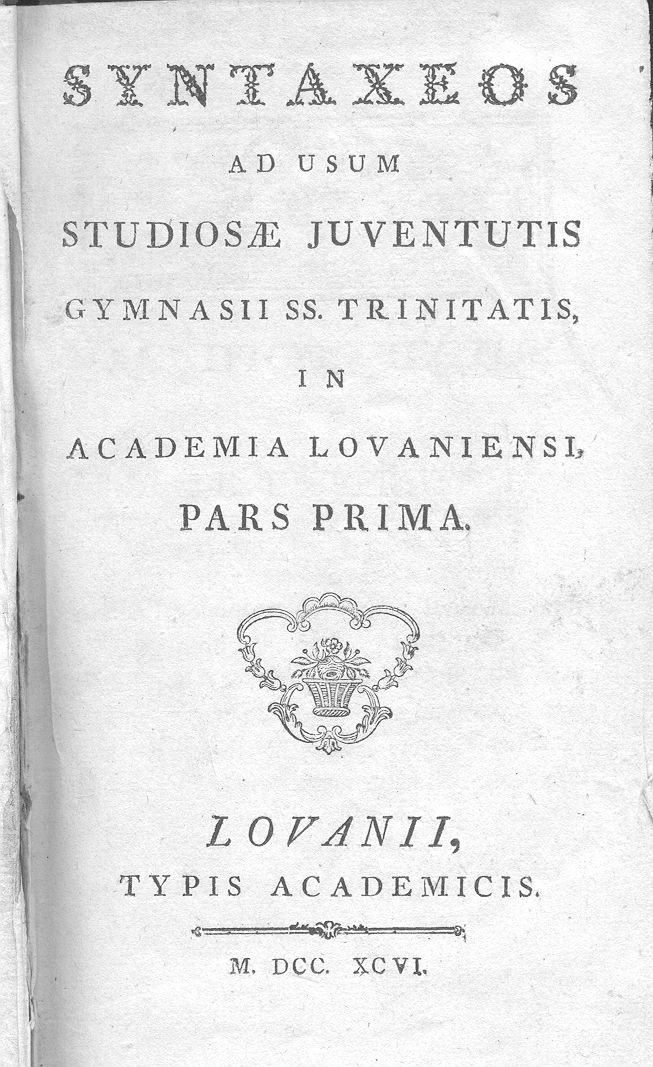 Syntaxeos liber, des presses de l'Université de Louvain, imprimé en 1796. Livre de syntaxe à l'usage des étudiants du Collège de la Sainte-Trinité ou le nouveau Collège, où l'on enseignait les Humanités (Collegium Sanctissimae Trinitatis) (Trinity College of Louvain).